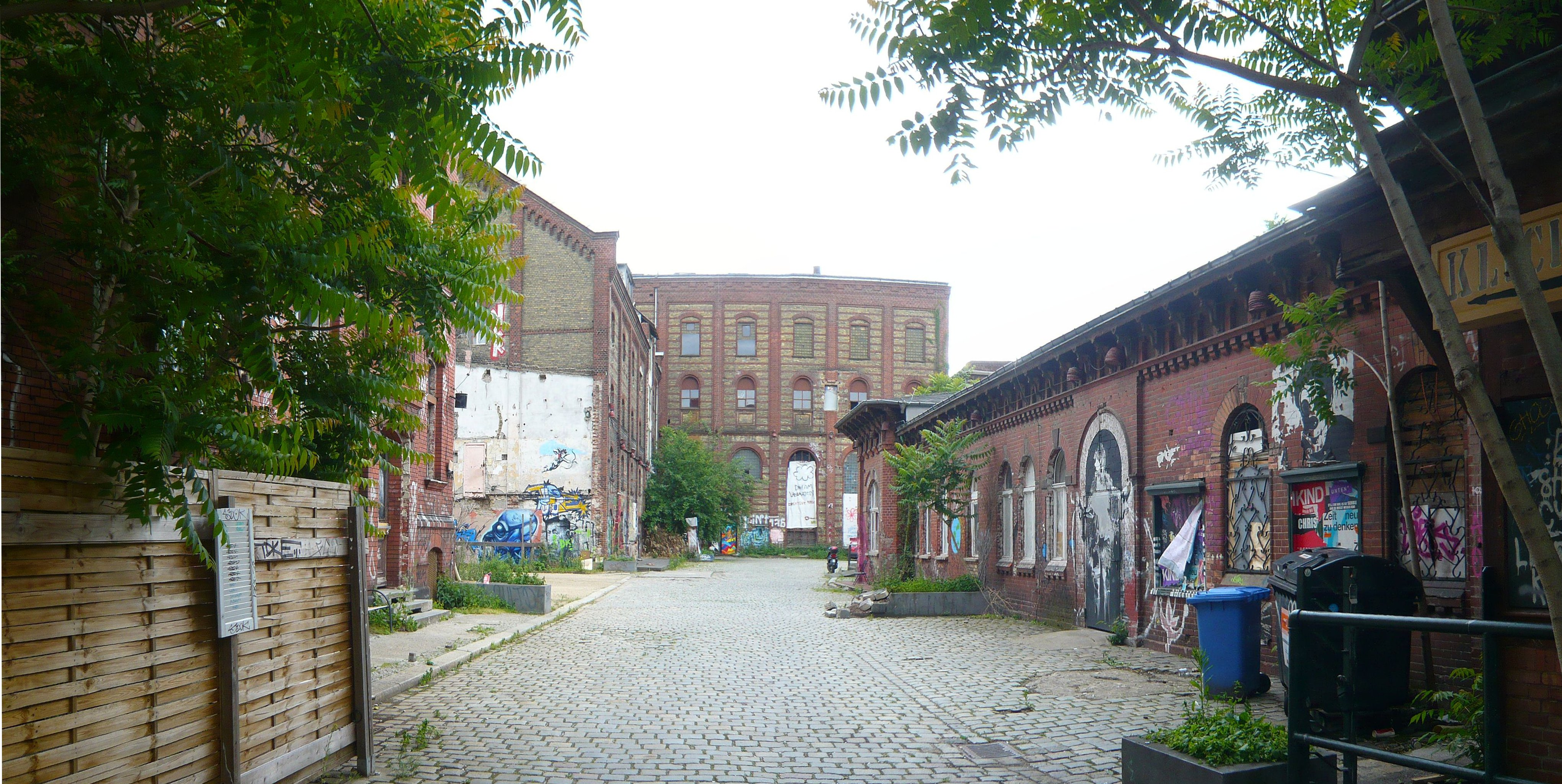 Berlin-Friedrichshain, ehemalige Brauerei Patzenhofer-Schultheiß, Hofpanorama